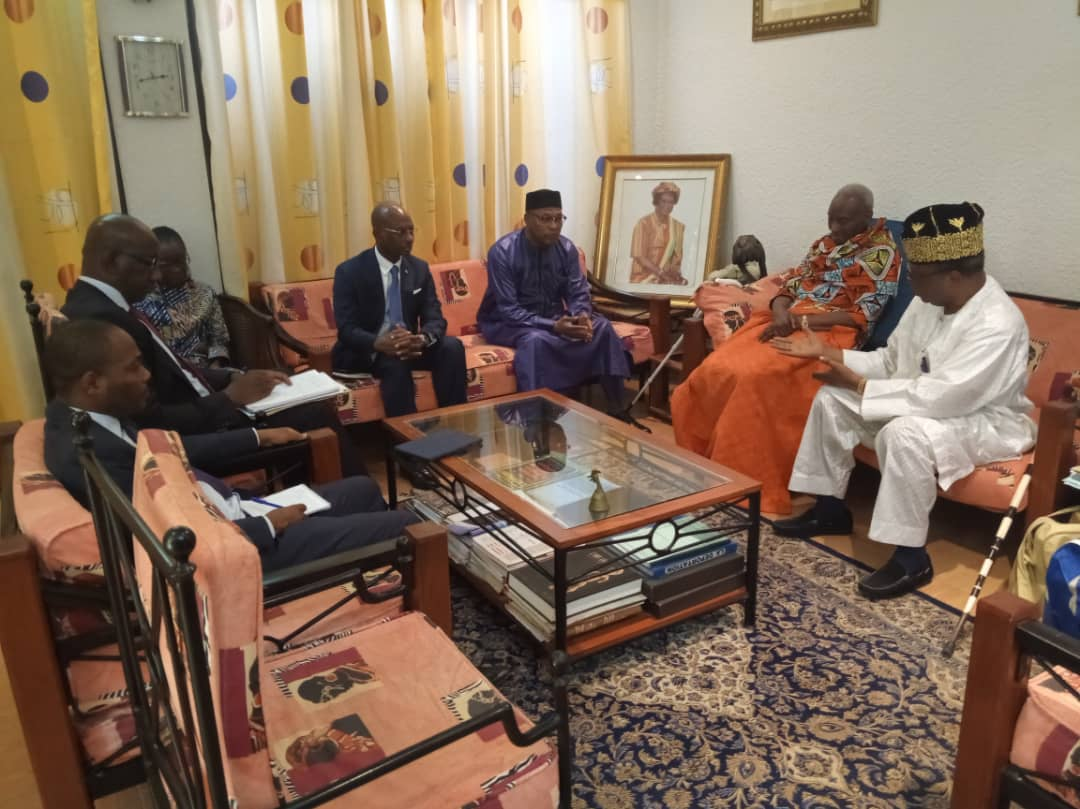 Visite de la délégation de l'ONU au domicile de Nicéphore Dieu Donnée Soglo, à Cotonou, le 22 mars 2019. (VOA/Ginette Fleure Adandé)